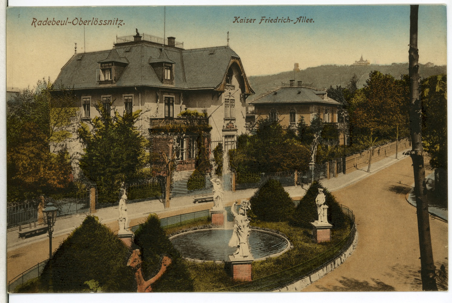 Radebeul; Kaiser Friedrich Allee This postcard is from publisher Brück & Sohn in Meißen ( postcard has a unique number 11180 and is available in a higher resolution at the publisher. This images was uploaded in a cooperation project between Wikipedians and the publisher.